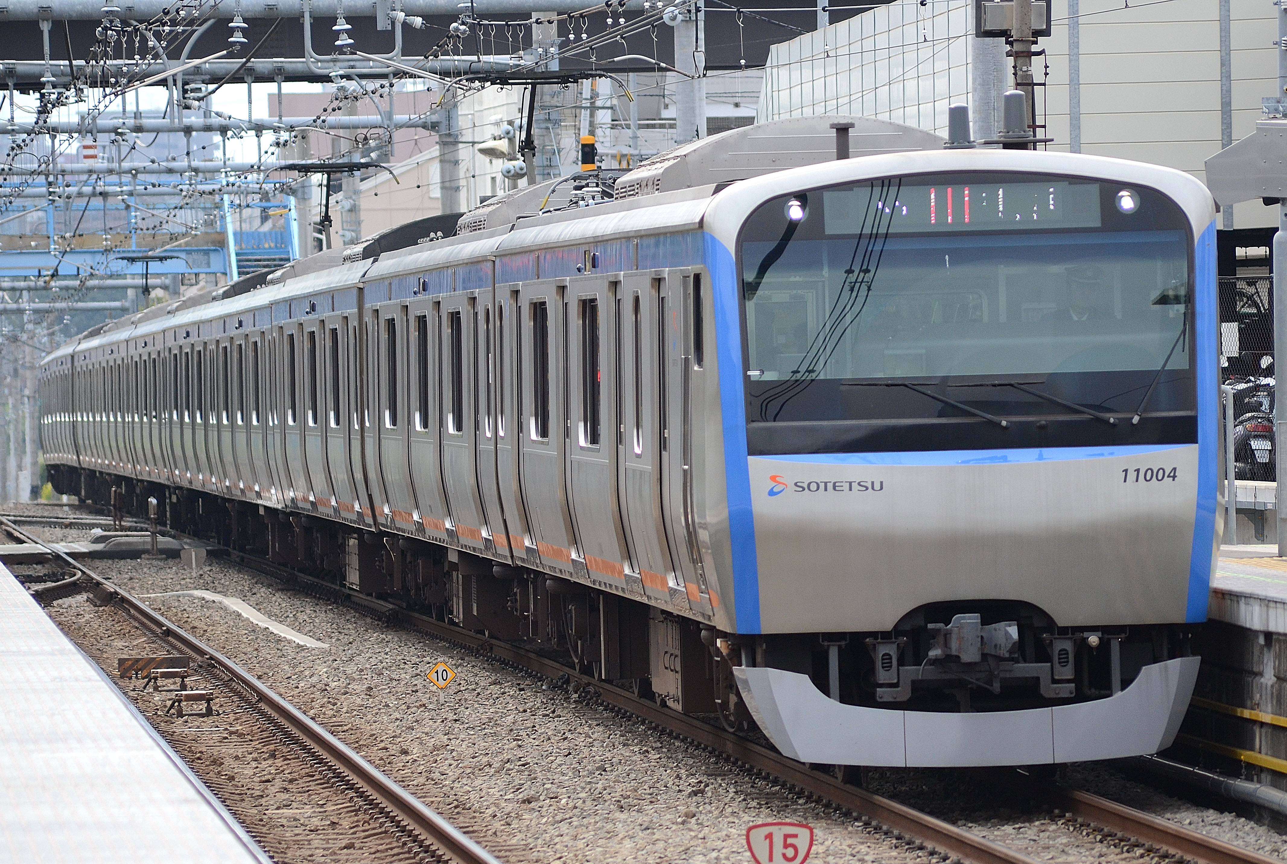 相模鉄道11000系電車